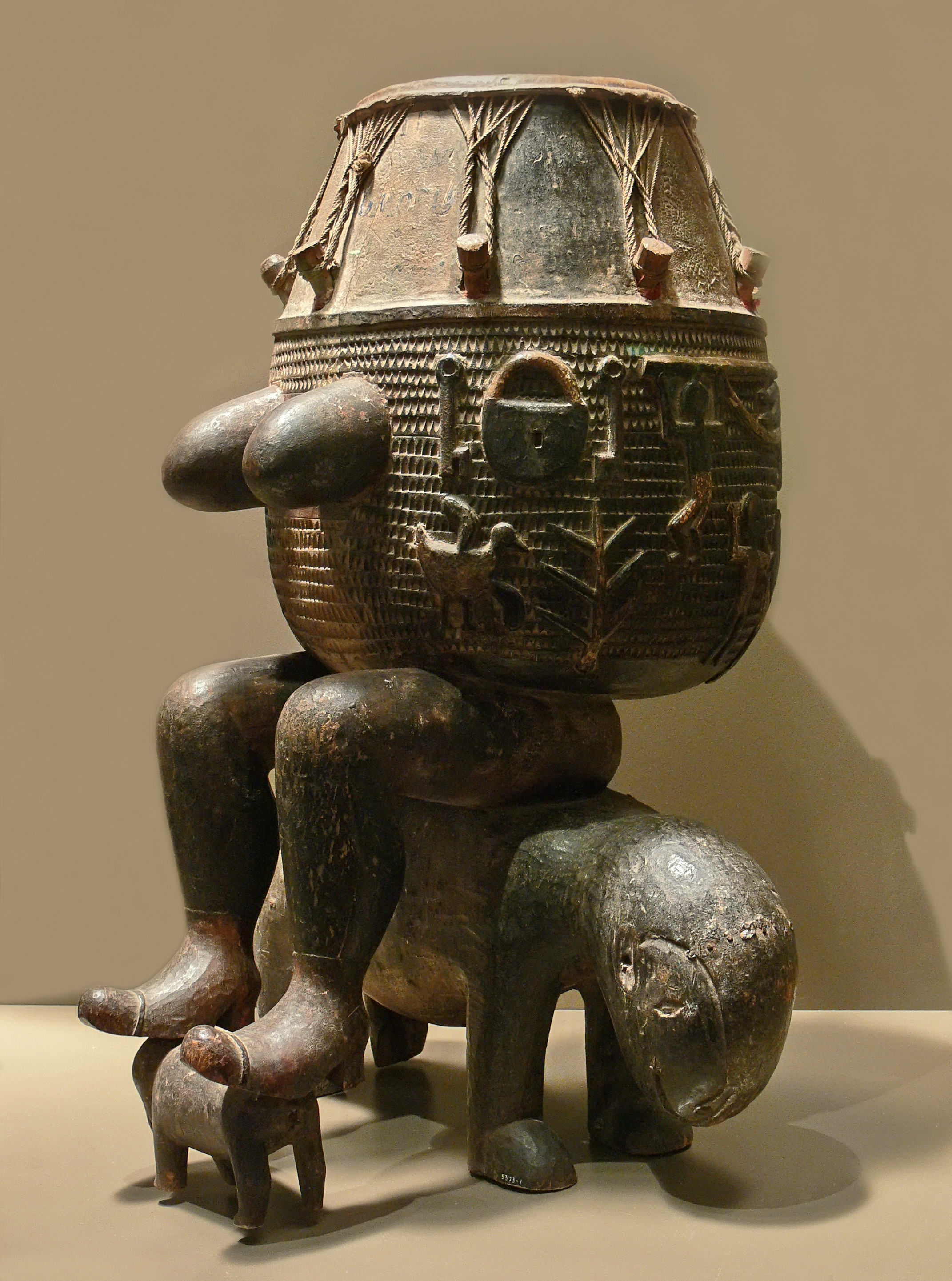 Trom (5373-1) Tropenmuseum - Trom